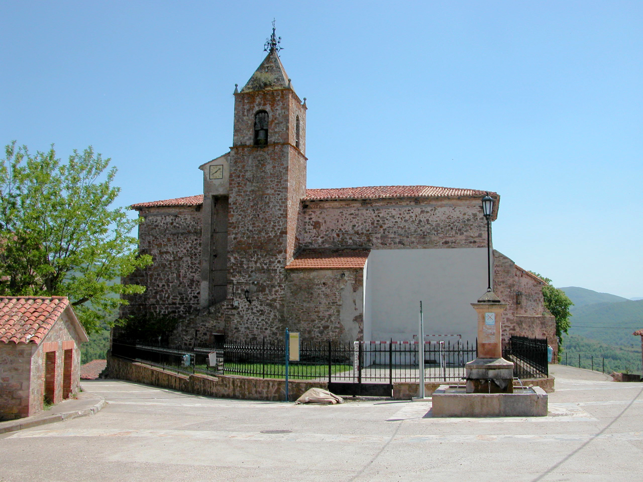 Iglesia de Nuestra Señora del Campillo (sXVI-XVII)